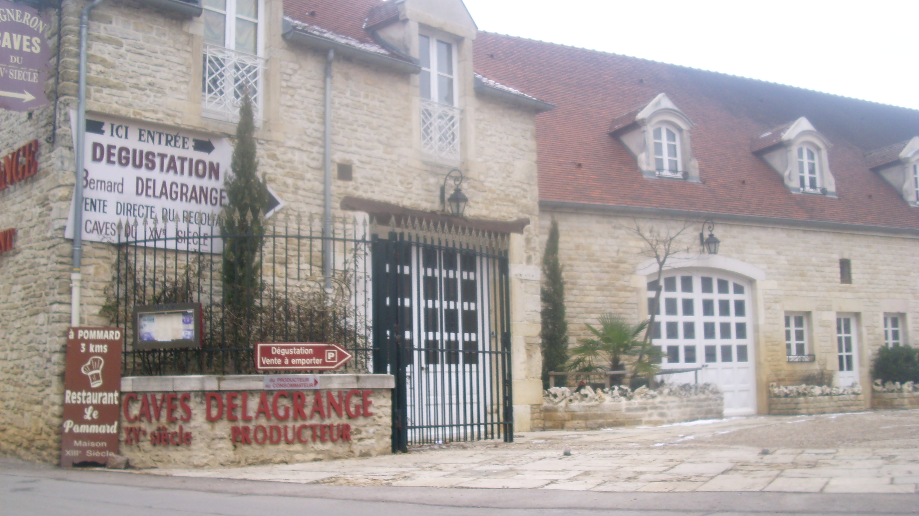 Entrée du domaine Bernard Delagrange à Meursault (21)